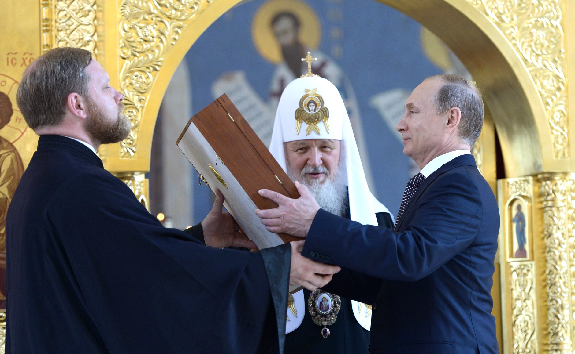 Патриарх Московский и всея Руси Кирилл подарил главе государства икону святого Владимира.